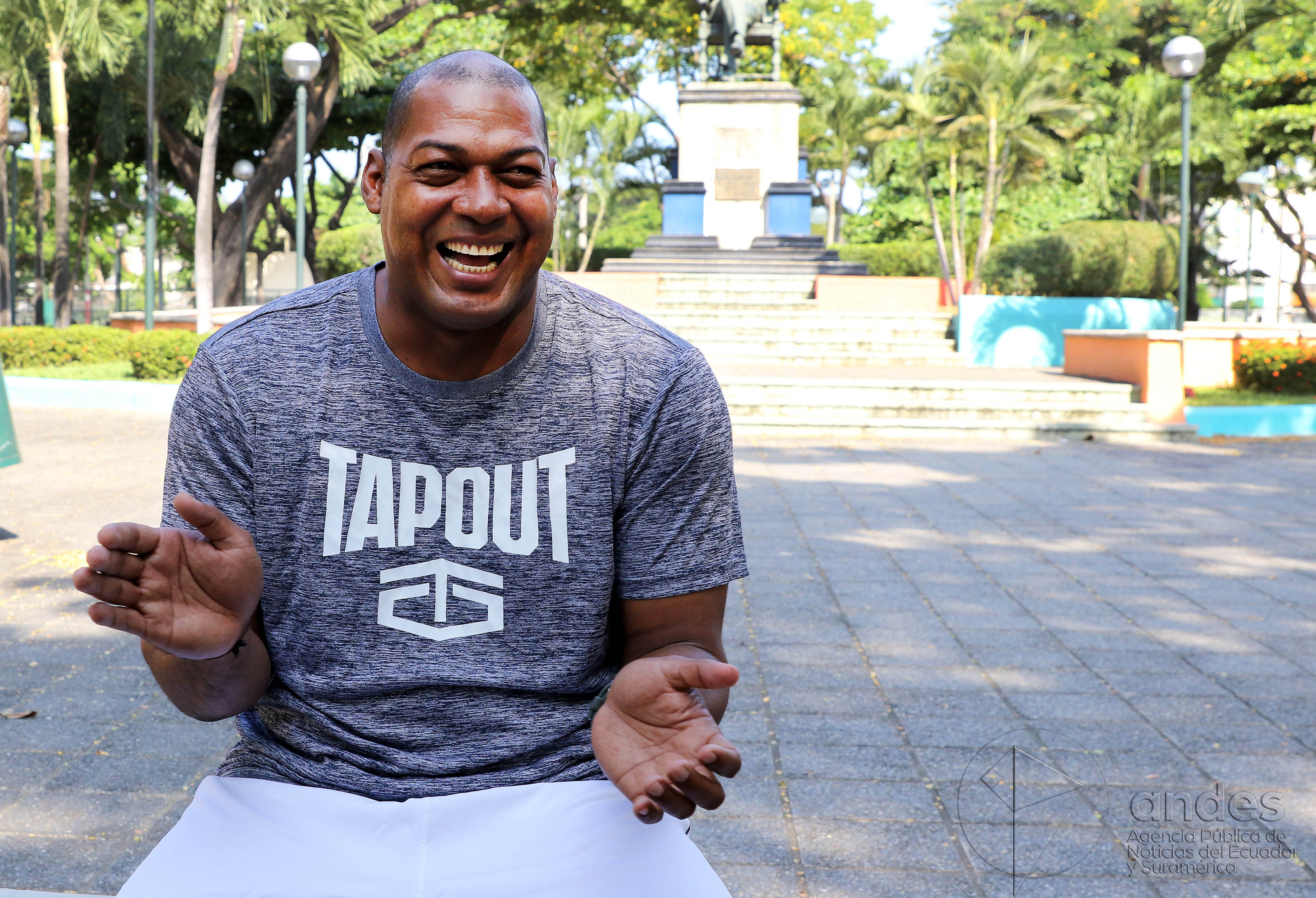 Guayaquil, miércoles 15 de junio del 2016 (Andes).-Eduardo "Tanque" Hurtado exjugador de la selección ecuatoriana de fútbol, recuerda su participación en el partido frente a EEUU en la Copa America que se realizó en Ecuador. Foto:Andes/César Muñoz